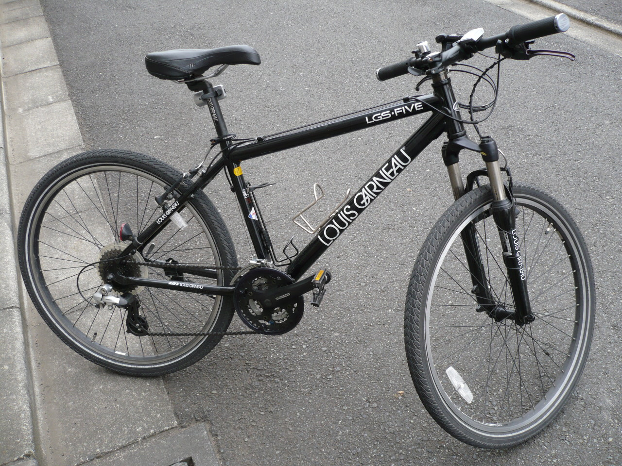 Bike, Canada (LOUIS GARNEAU: LGS-FIVE)